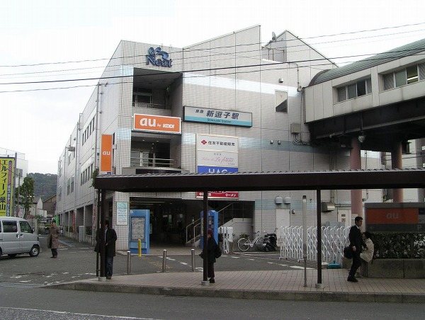 新逗子駅北口 2006年11月26日、投稿者が撮影。